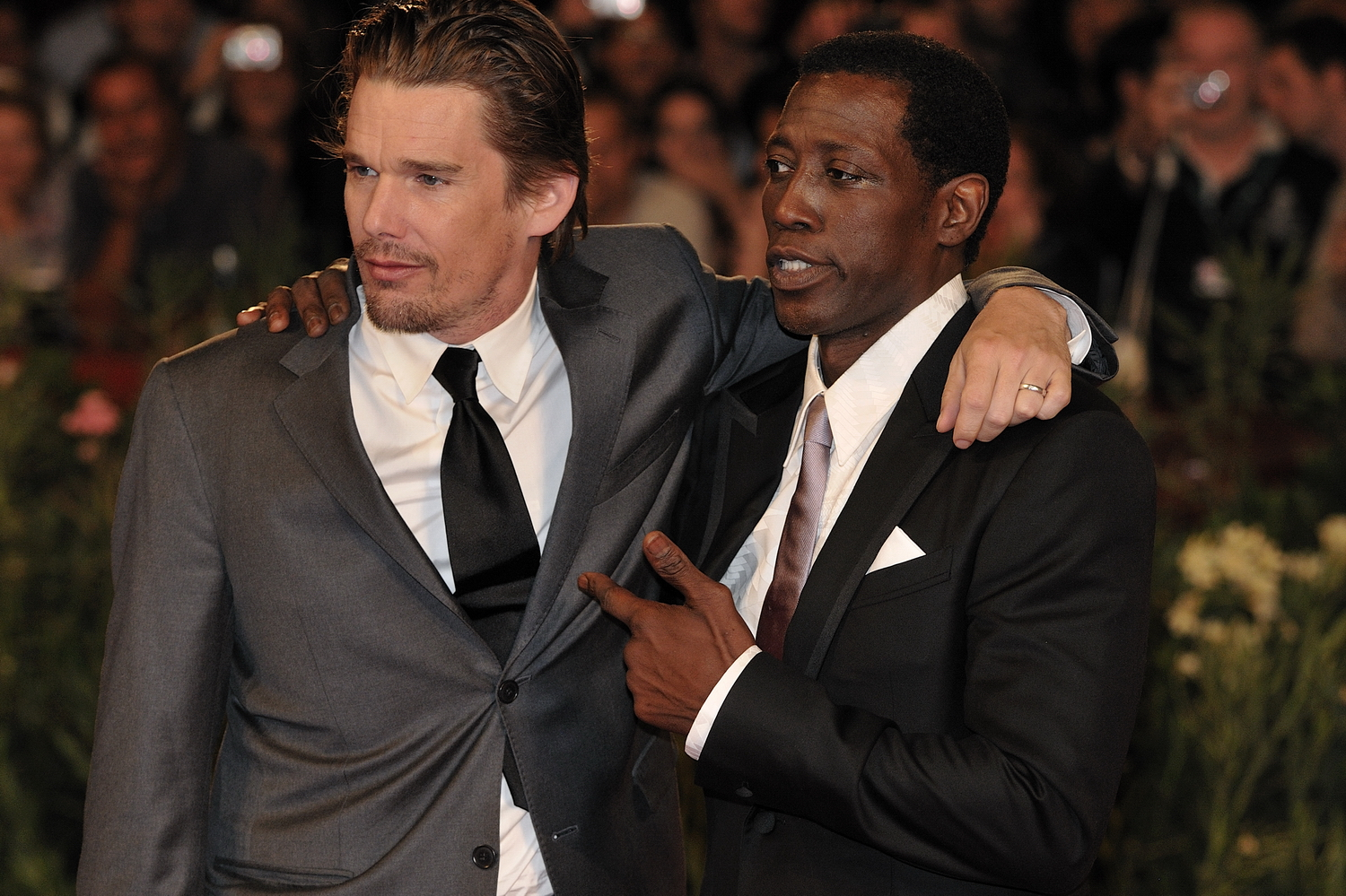 66ème Festival du Cinéma de Venise (Mostra), 8ème jour (07/09/2009) Tapis rouge avec Ethan Hawke et Wesley Snipes et le réalisateur Antoine Fuqua pour le film : Brooklyn's finest